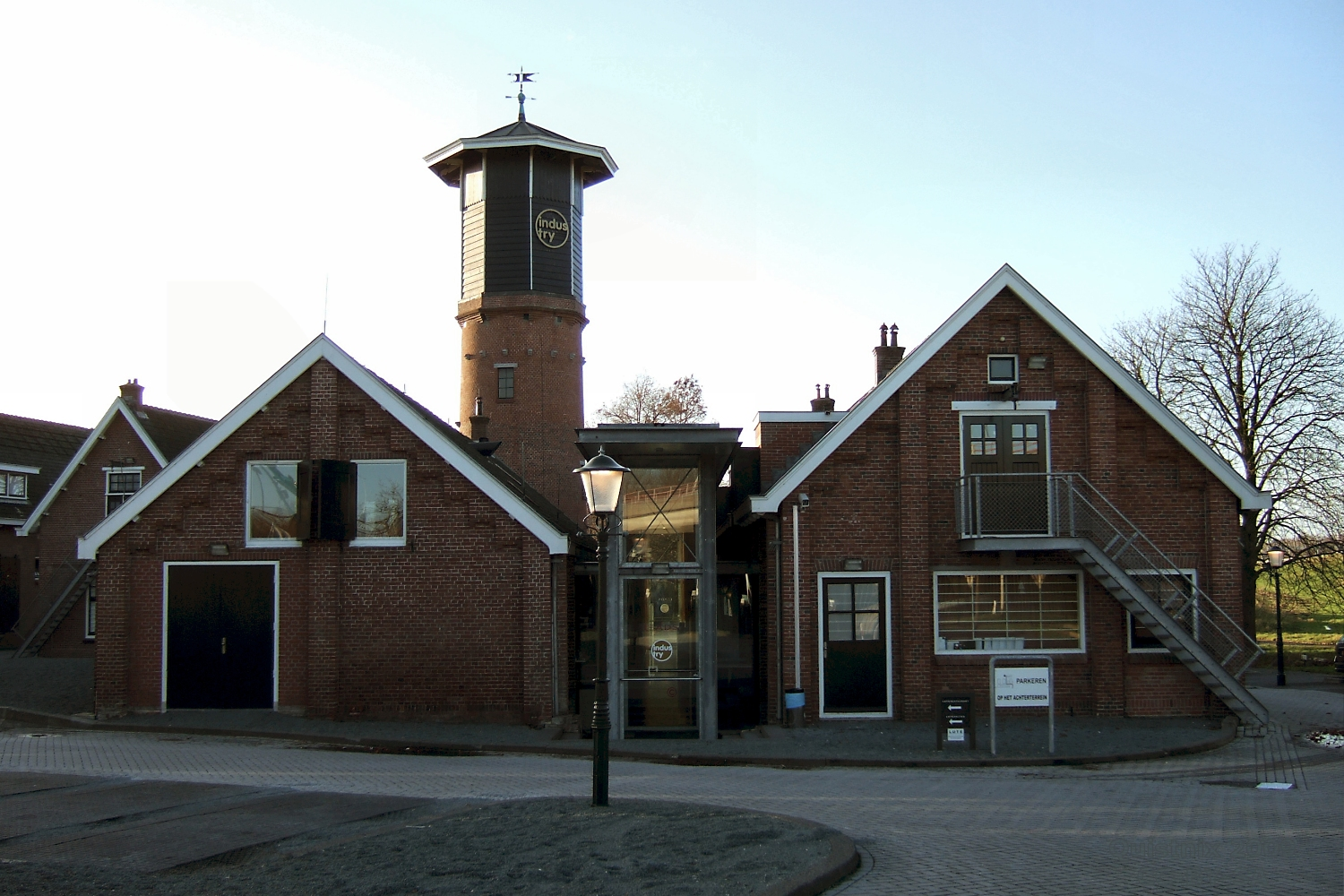 Ouderkerk/Amstelveen: Kruitfabriek De Oude Molen